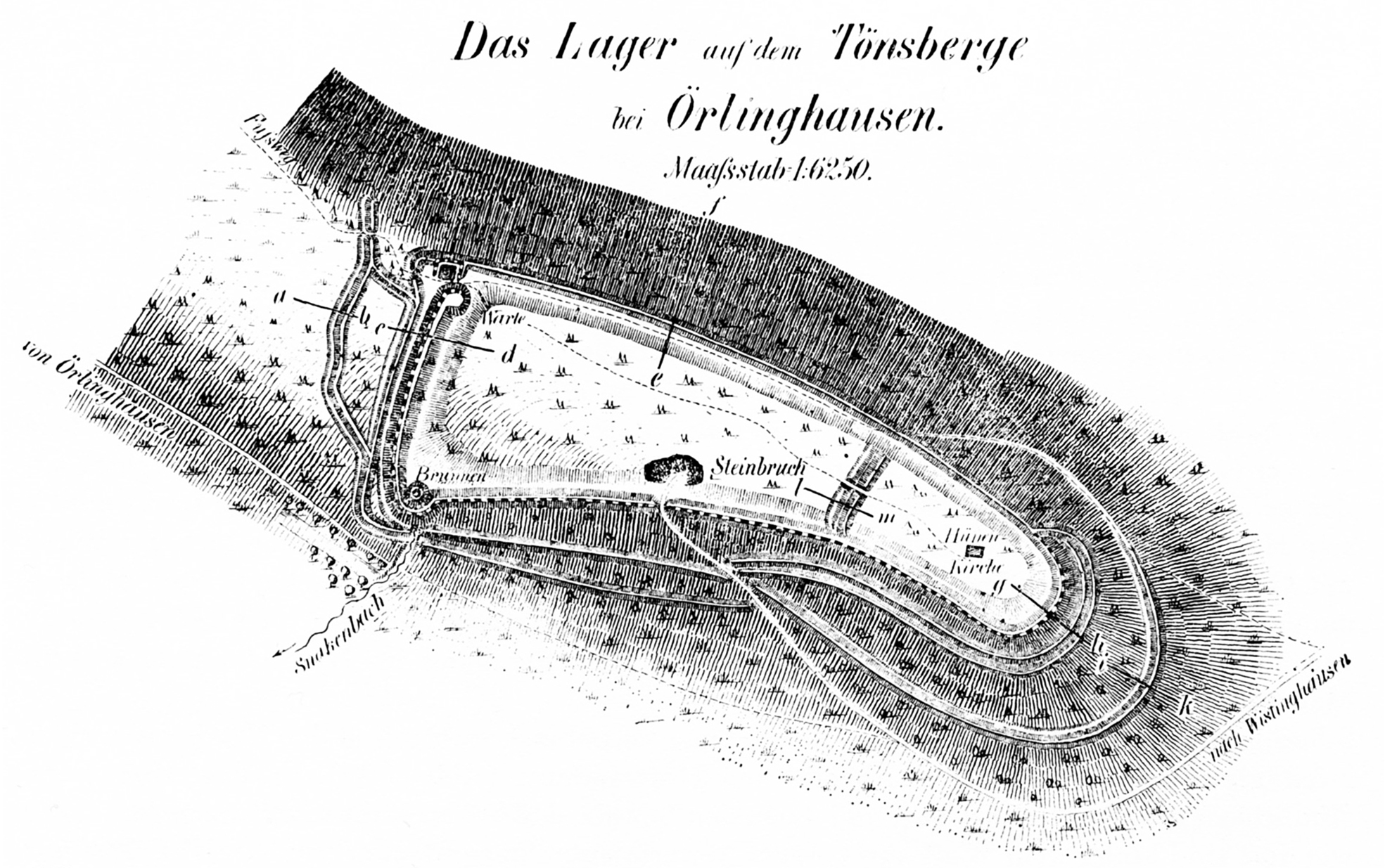 Tönsberg, Lageplan der Wallburg nach Ludwig Hölzermann (1830-1870)